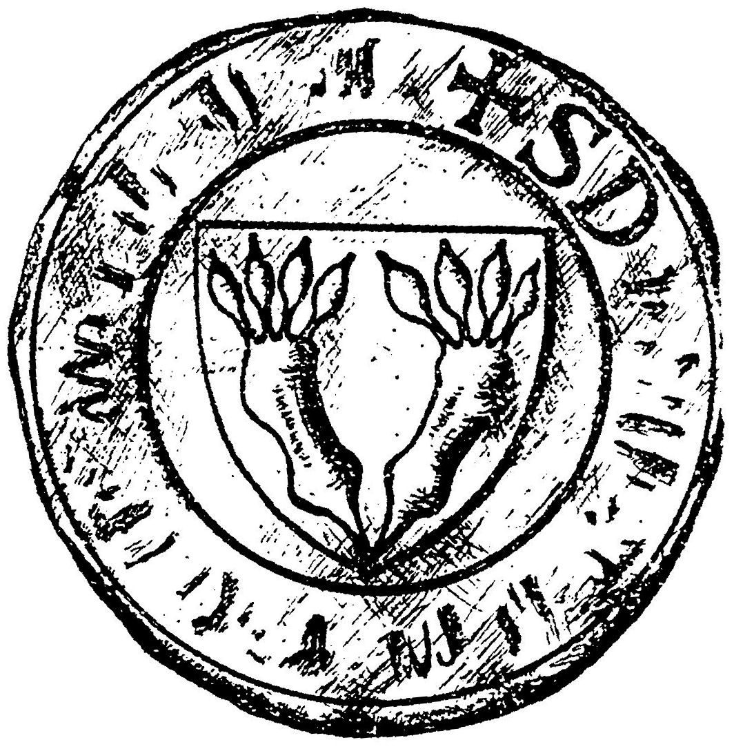 Siegel des Bischofs Gerhard III. von Hoya (um 1360-1398)